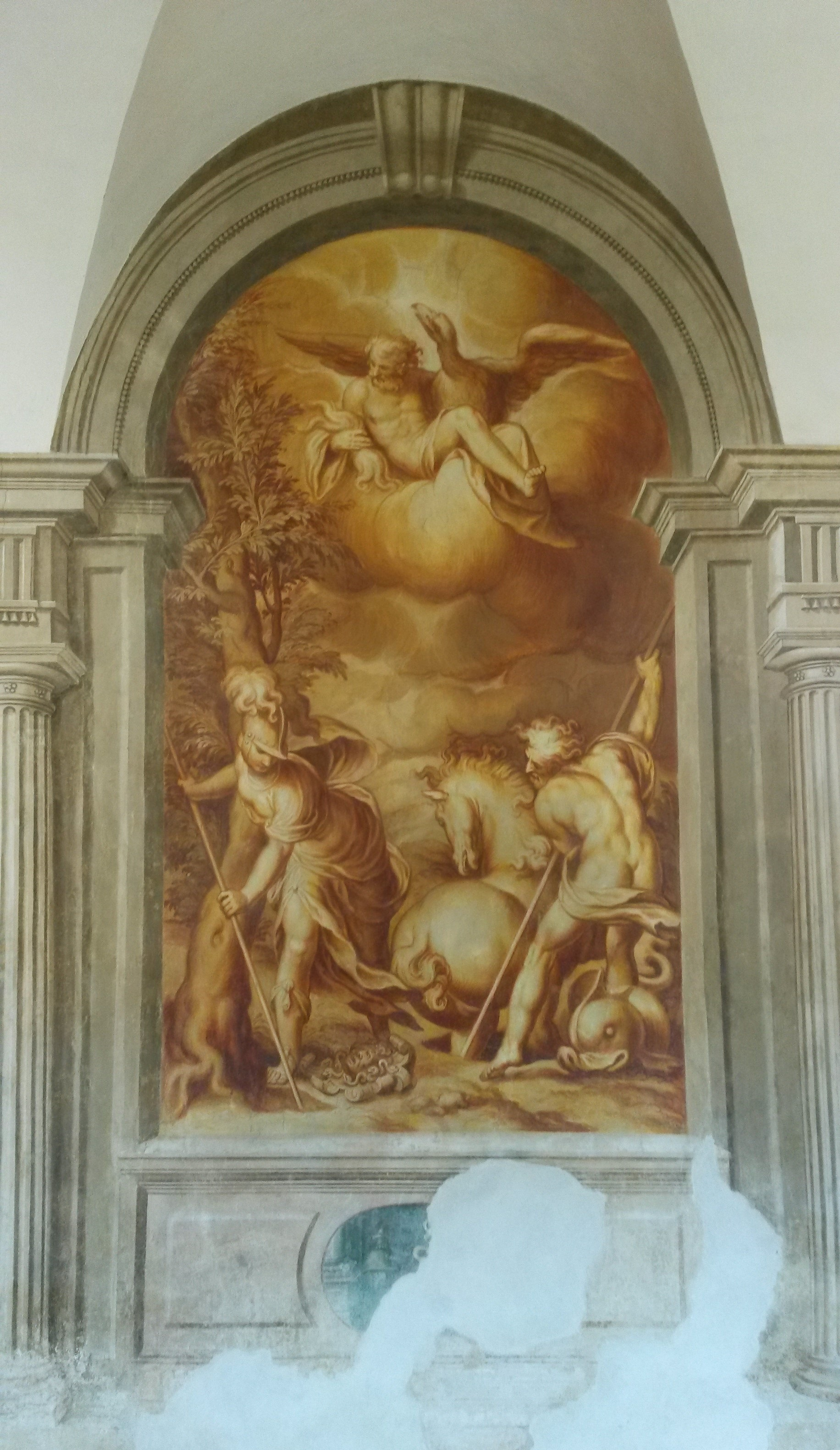 Paolo Farinati, "Contesa fra Athena e Poseidone", 1590 circa, affresco (restaurato nel 2016). Athena dona una pianta d'ulivo, Poseidone dona il primo cavallo, facendolo uscire dalle viscere della terra. Zeus, in alto, giudica vincitrice Athena, che diventerà patrona dell'Attica e della città di Atene.